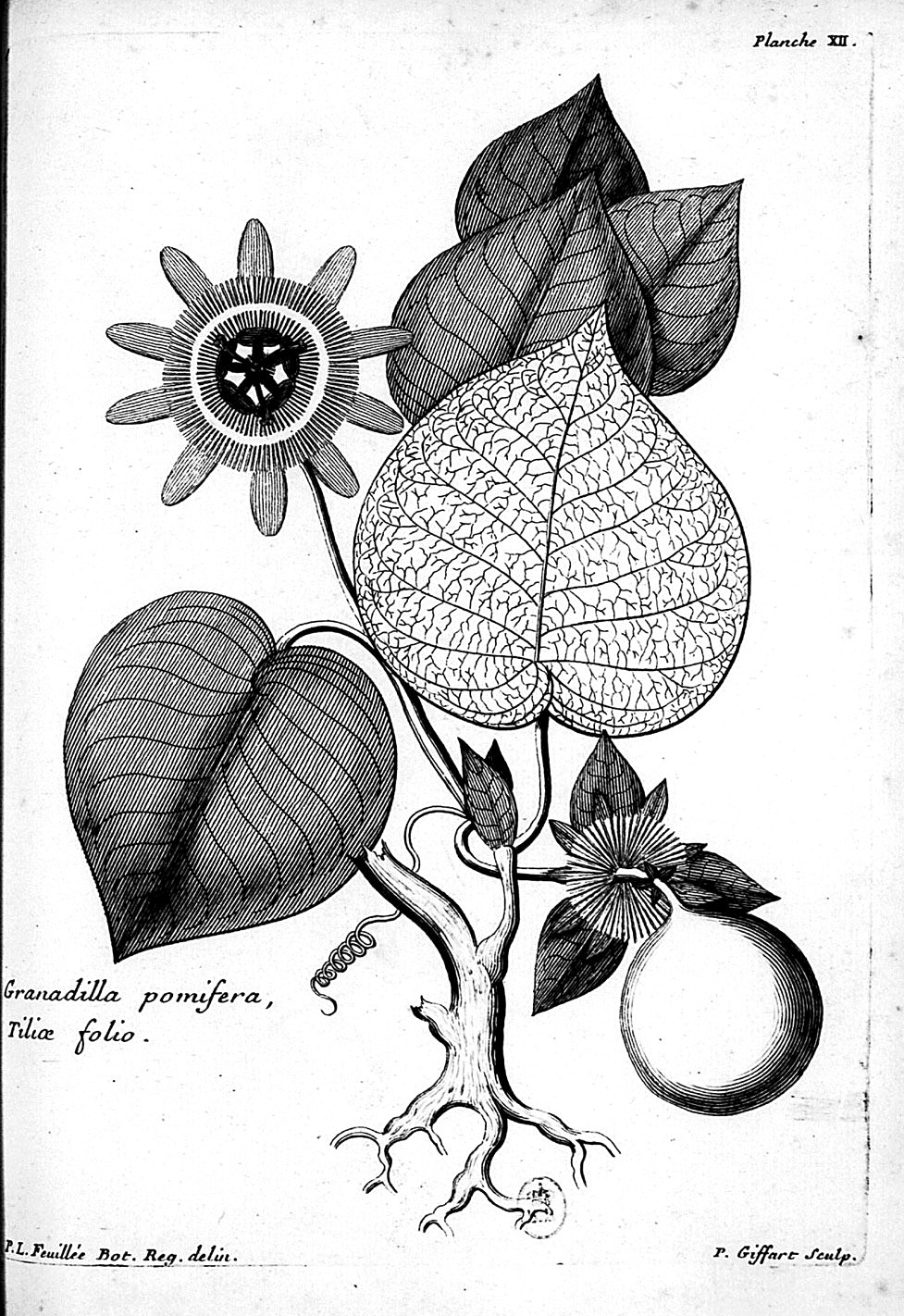 "Granadilla pomifera". In: "Journal des Observations Physiques, Mathematiques et Botaniques, faites par l'ordre du roy sur les côtes orientales de l'Amérique méridionale et dans les Indes occidentals depuis l'année 1707 jusques en 1712." by Louis Feuillee, (1660-1732).